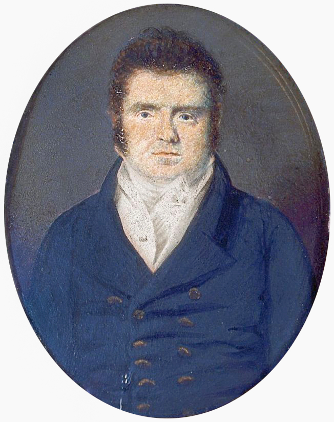 John Edward Taylor (editore)